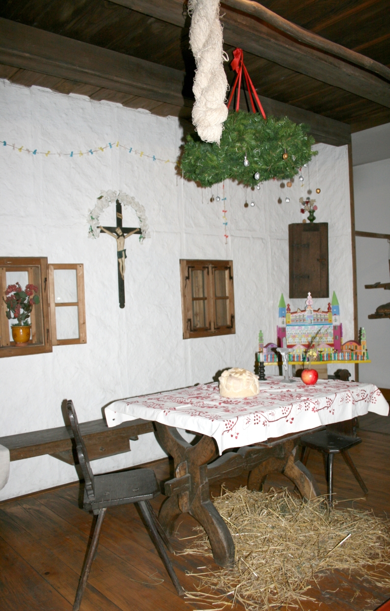 Hrvatski božićni običaji; snimljeno tijekom Noći muzeja u Etnografskom muzeju u Zagrebu